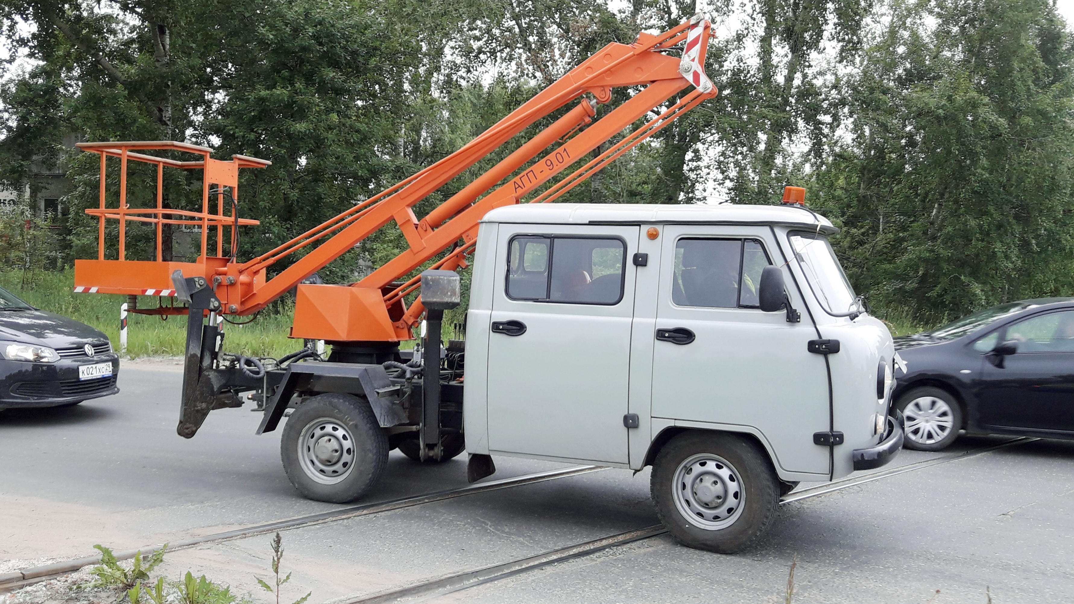 Автоподъемник на шасси УАЗ